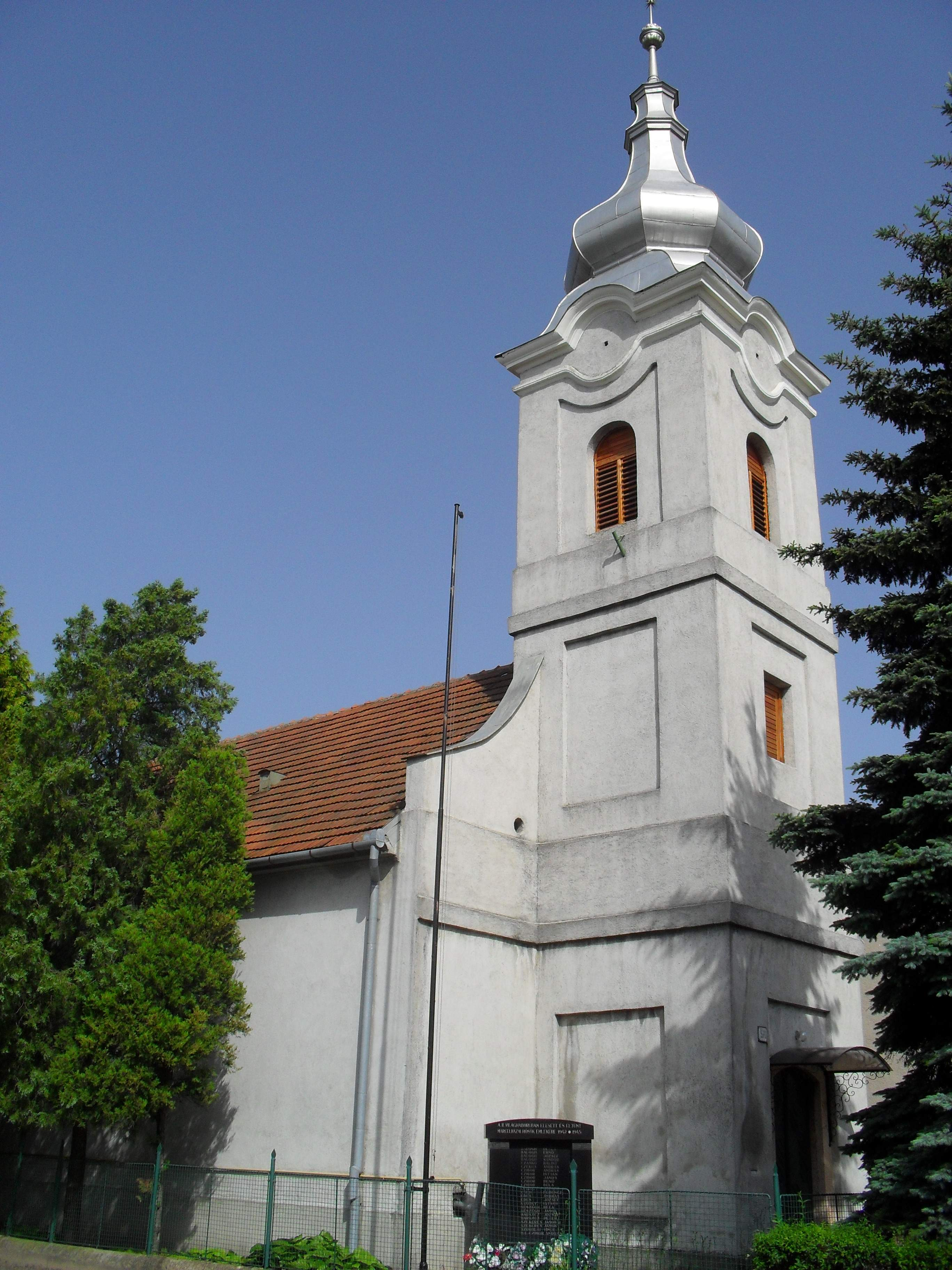 Marcelháza - református templom